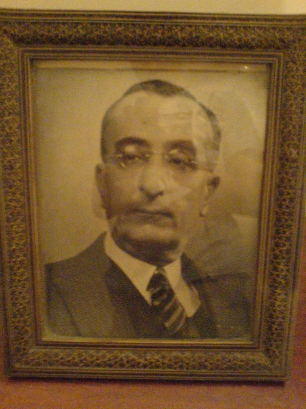 Sir Ismail Mirza... my great uncle.HumayunMirzaJR 08:45, 17 April 2007 (UTC) Humayun Mirza Jr